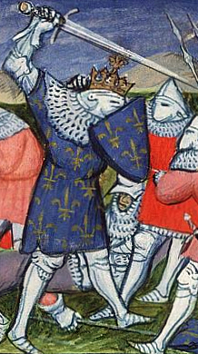 Француский рыцарь XIV века. Миниатюра (Битва при Пуатье). Фрагмент